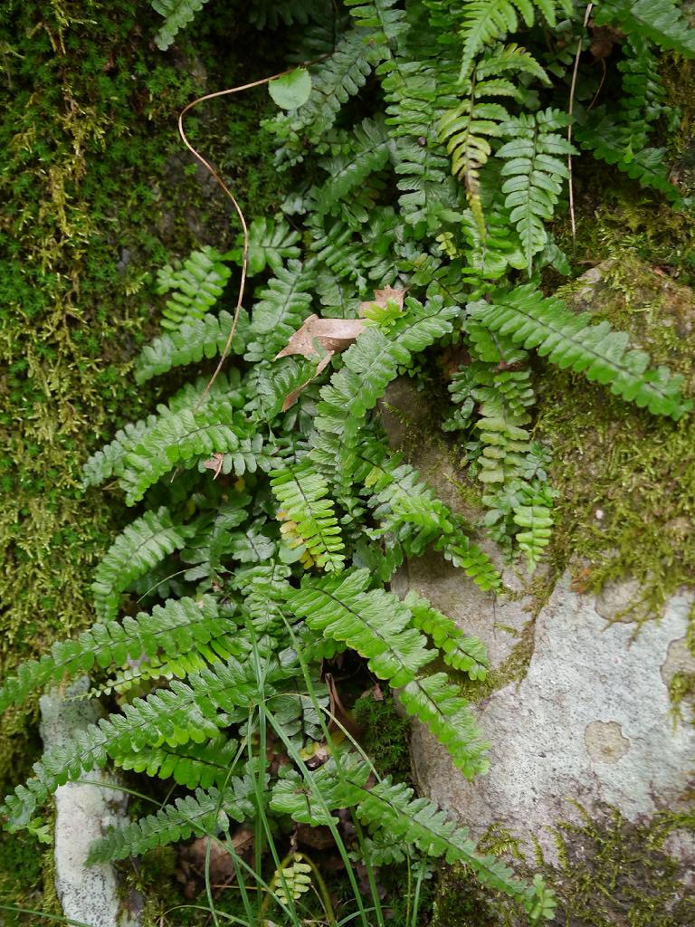 Asplenium normale：ヌリトラノオ 2014/10/12 和歌山県田辺市：Tanabe City. Wakayama Pref. Japan